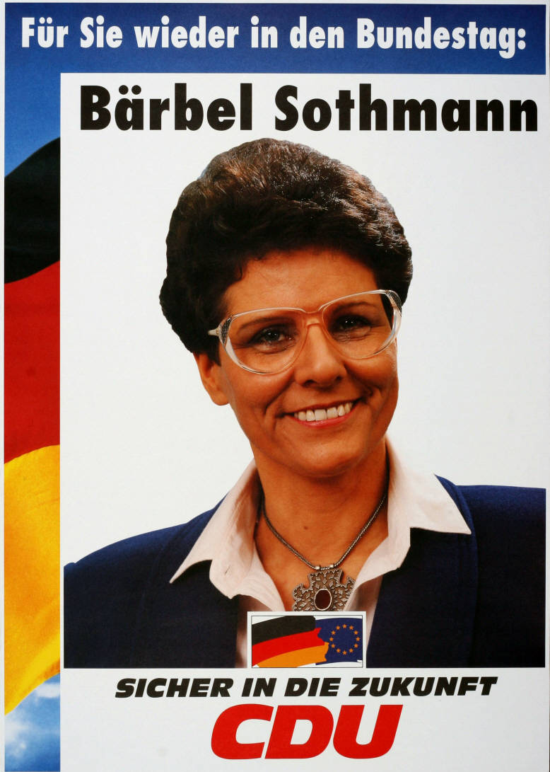 Für Sie wieder in den Bundestag: Bärbel Sothmann Sicher in die Zukunft CDUAbbildung:Porträtfoto - NationalfarbenPlakatart:Kandidaten-/Personenplakat mit PorträtObjekt-Signatur:10-001 : 4075Bestand:Plakate zu Bundestagswahlen (10-001)GliederungBestand10-18:Plakate zu Bundestagswahlen (10-001) » Die 13. Bundestagswahl am 16. Oktober 1994 » CDU » Mit PorträtfotoLizenz:KAS/ACDP 10-001 : 4075 CC-BY-SA 3.0 DE